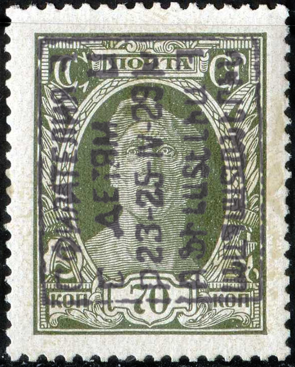 Агитационно-благотворительная марка ССР Армении (надпечатка на стандартной марке СССР), 1929.